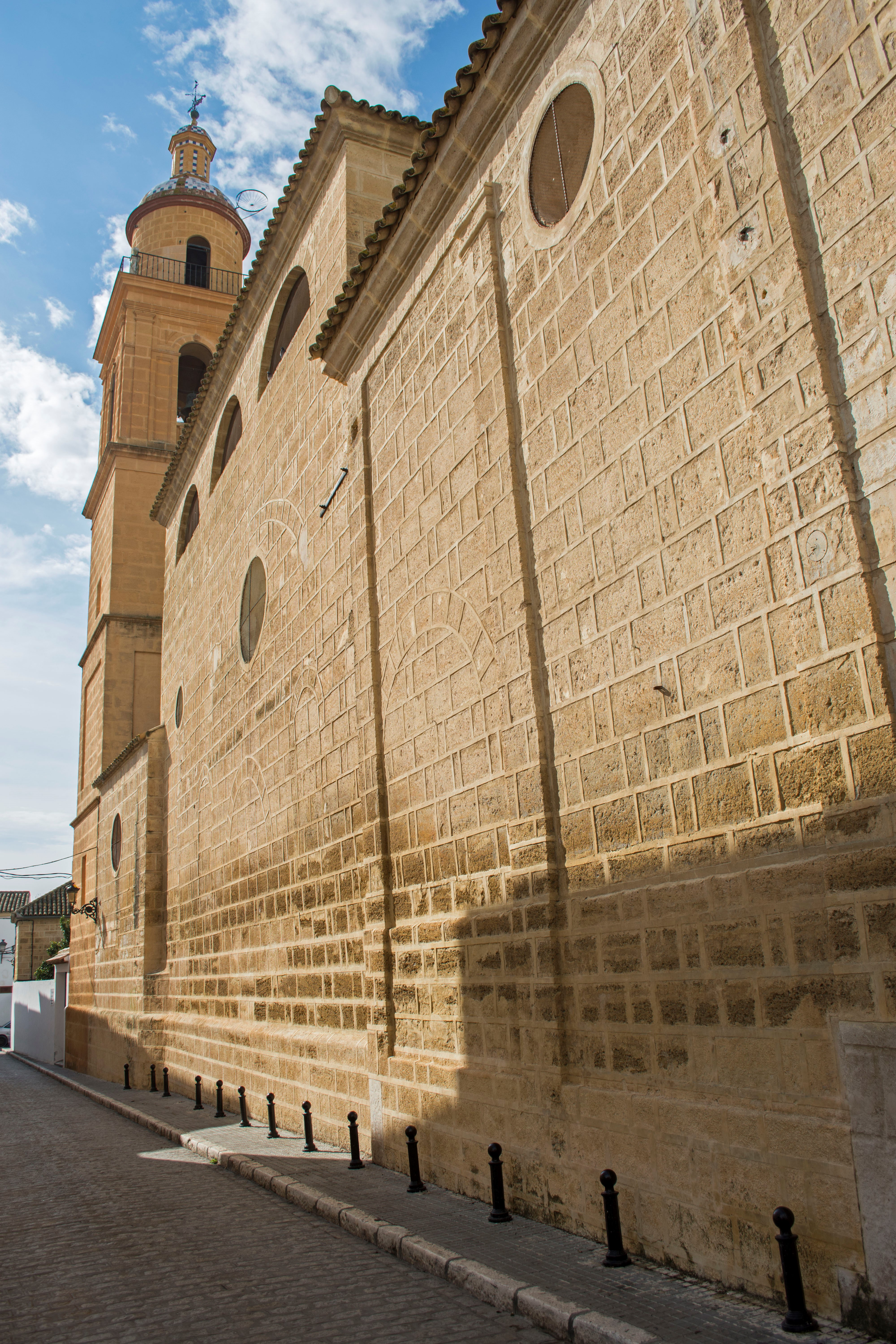 Exterior de la iglesia de San Carlos, Osuna.